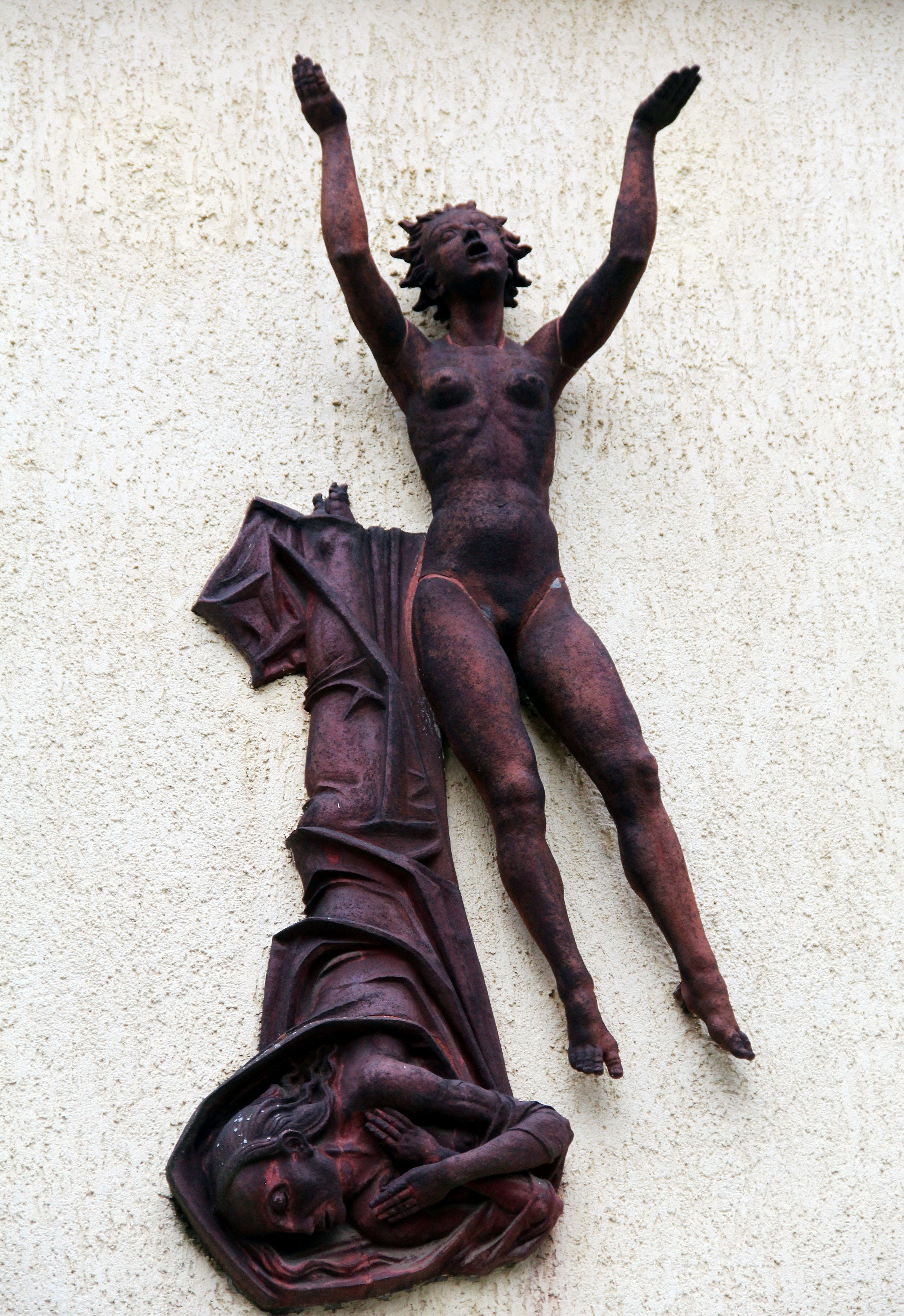 Krematorium Meißen Skulptur an der Fassade